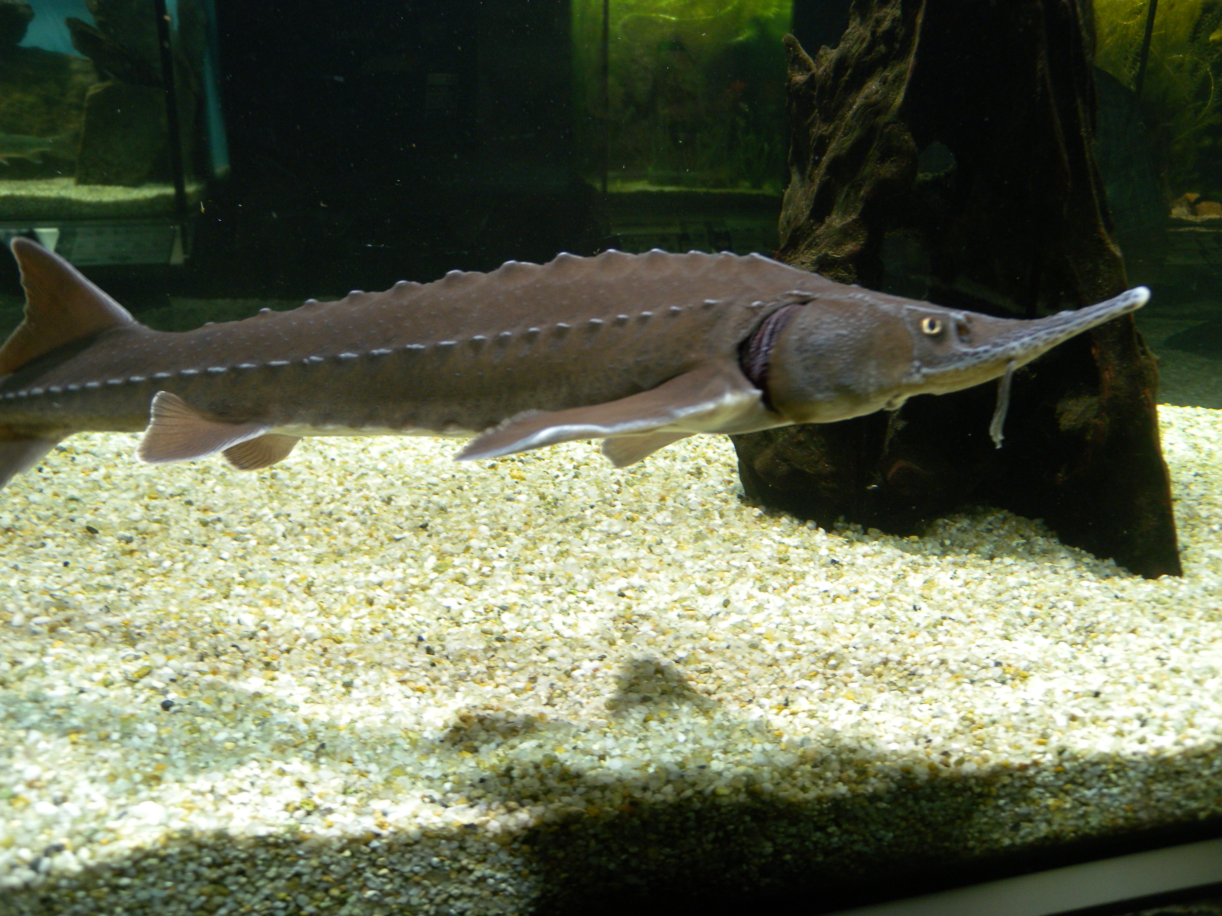 Unterwasserreich in Schrems, Niederösterreich